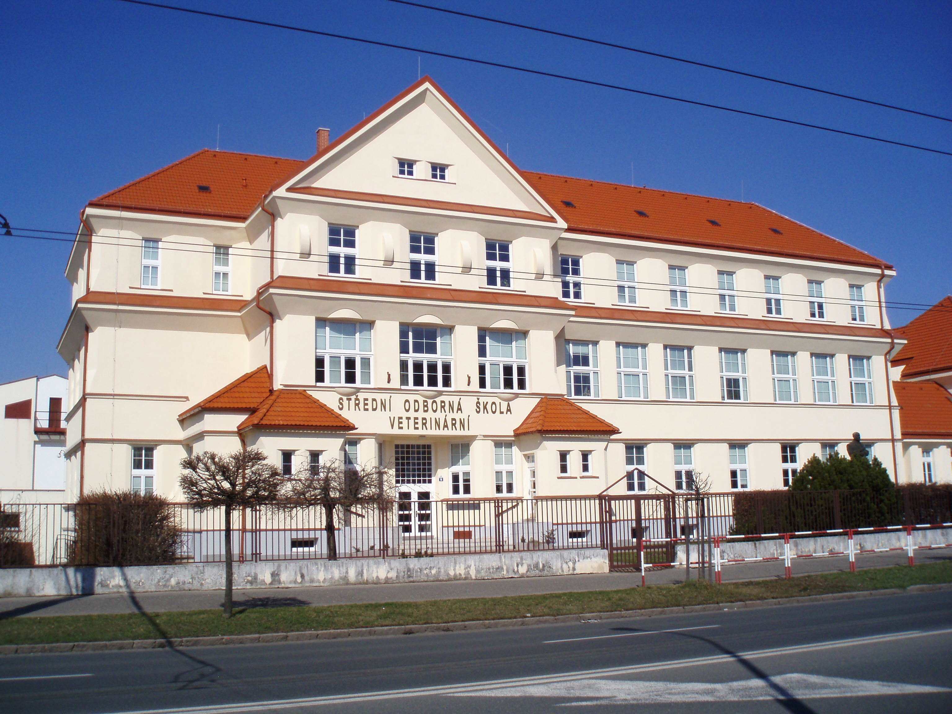 SOŠ veterinární